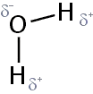 PNG-Version eines Bildes von Sansculotte.